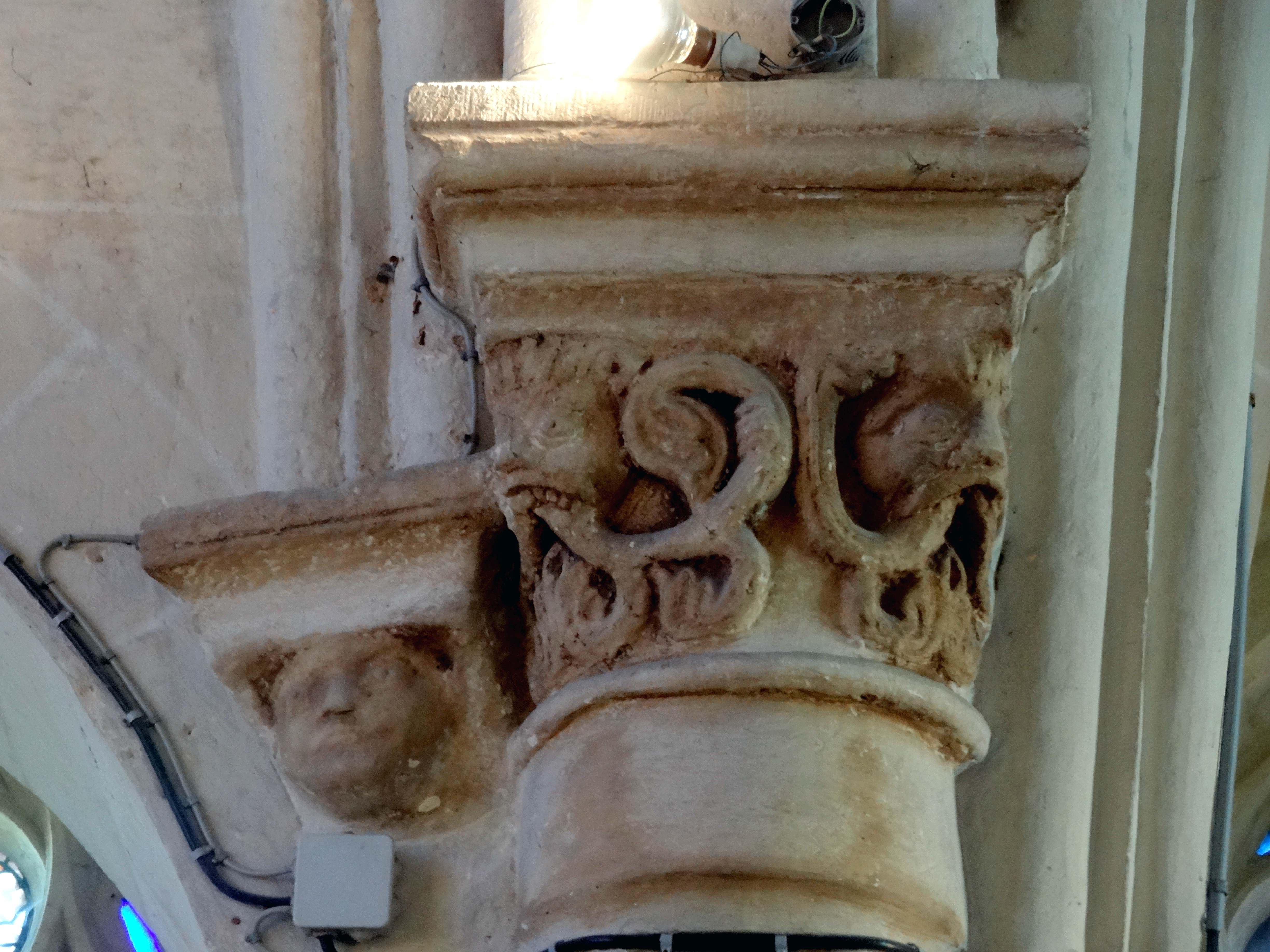 Intérieur de l'église - voir titre.